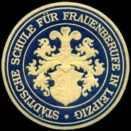 Sealing stamp Title: Städtische Schule für Frauenberufe in Leipzig Description: weiß, dunkelblau, geprägt Place: Leipzig size: 4 cm